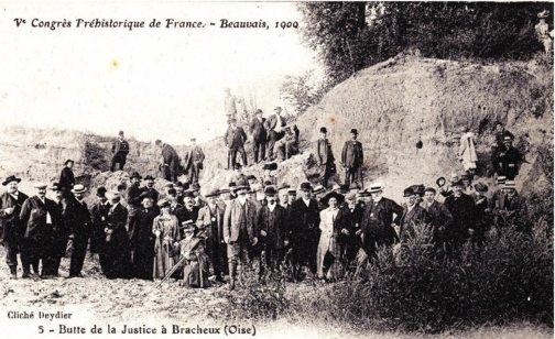 Photographie de groupe des participants au Congrès Préhistorique de France de 1909, à Beauvais.